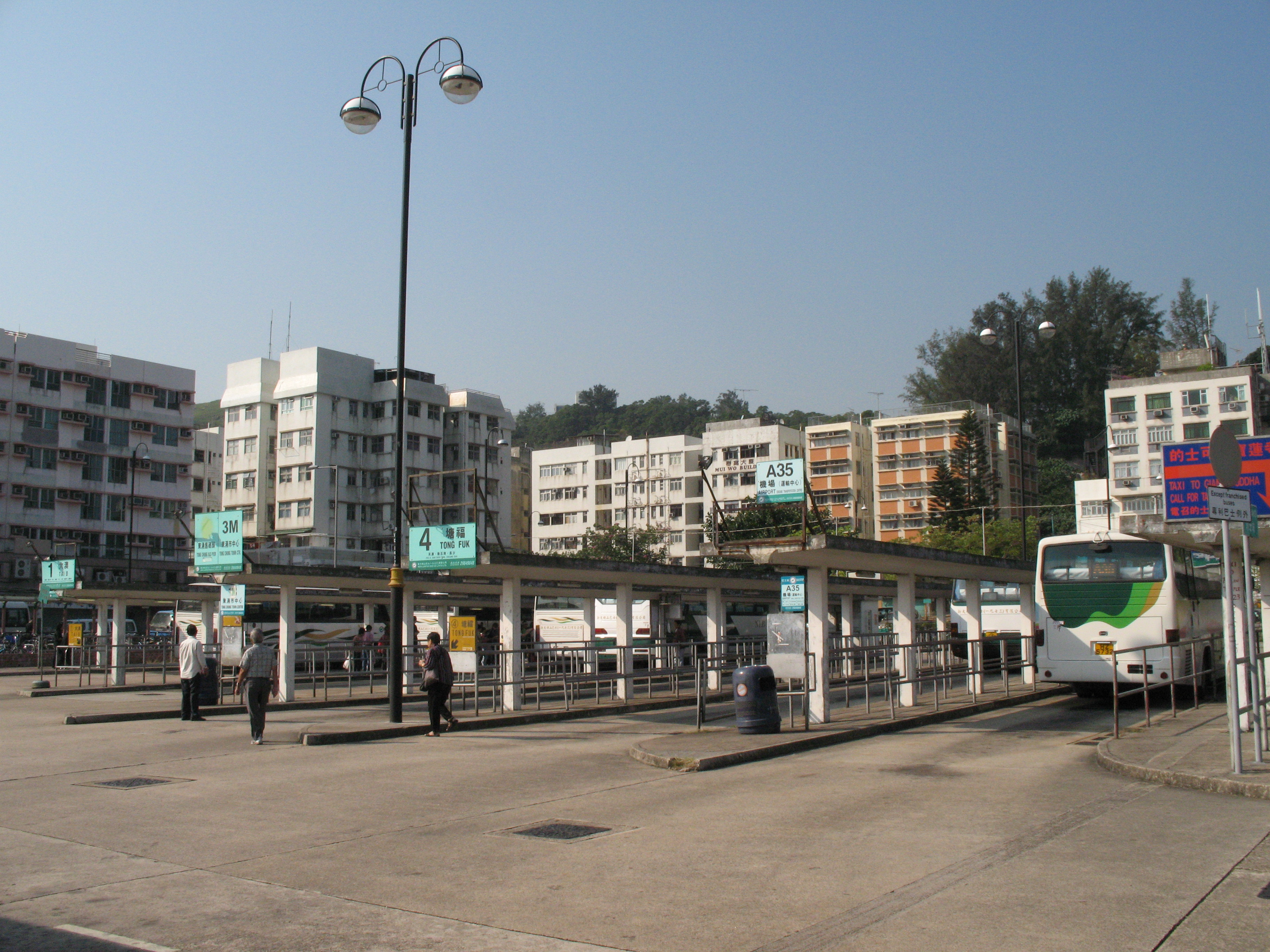 Bus Terminal at Mui Wo